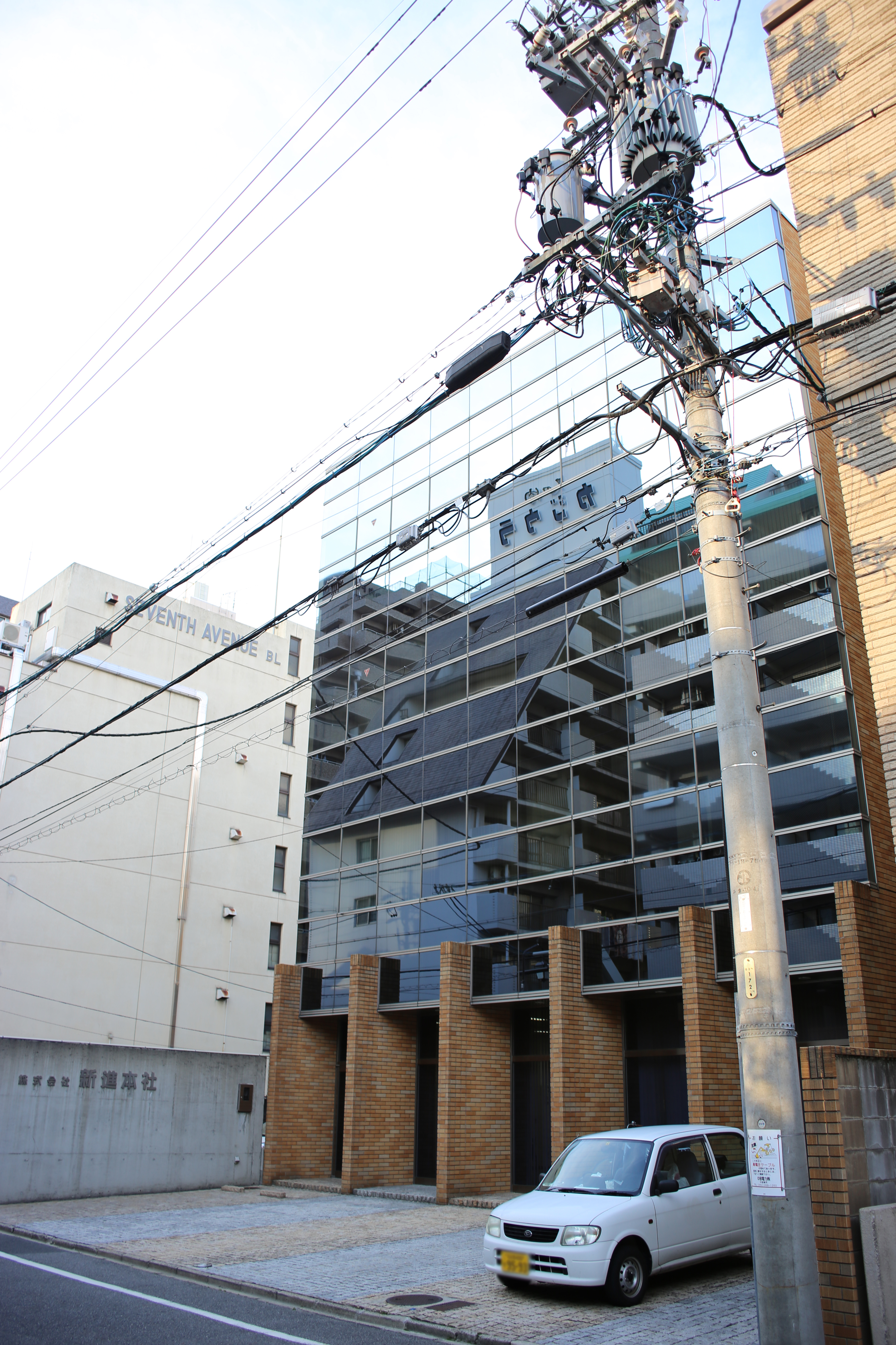 名古屋市中区丸の内一丁目の新進本社を西側公道南側より撮影。ただし、ナンバープレートにつき画像処理済み。